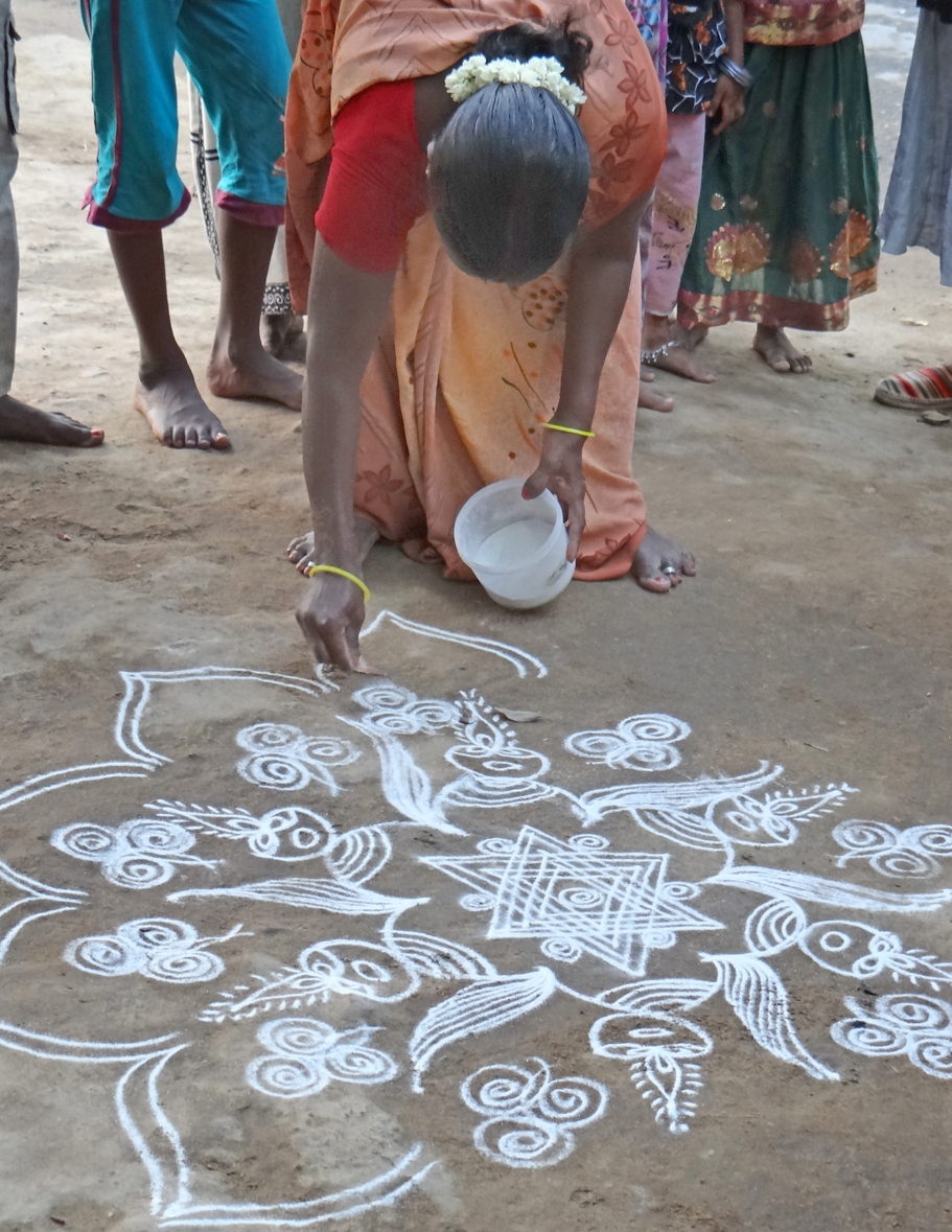 Dessin avec de la farine de riz (kolam) devant un petit temple dédié à Ganesh dans le village de Patteeshwaram au sud de Darasuram au Tamil Nadu Dans le sud de l'Inde, ce sont les femmes qui pratiquent l'art du kolam, devant les maisons en signe de bienvenue mais aussi, devant un temple, comme dans ce cas, en l'honneur de la divinité car ce temple privé dédié à Ganesh, réalisé à l'initiative d'une famille, est sur le point d'être consacré.